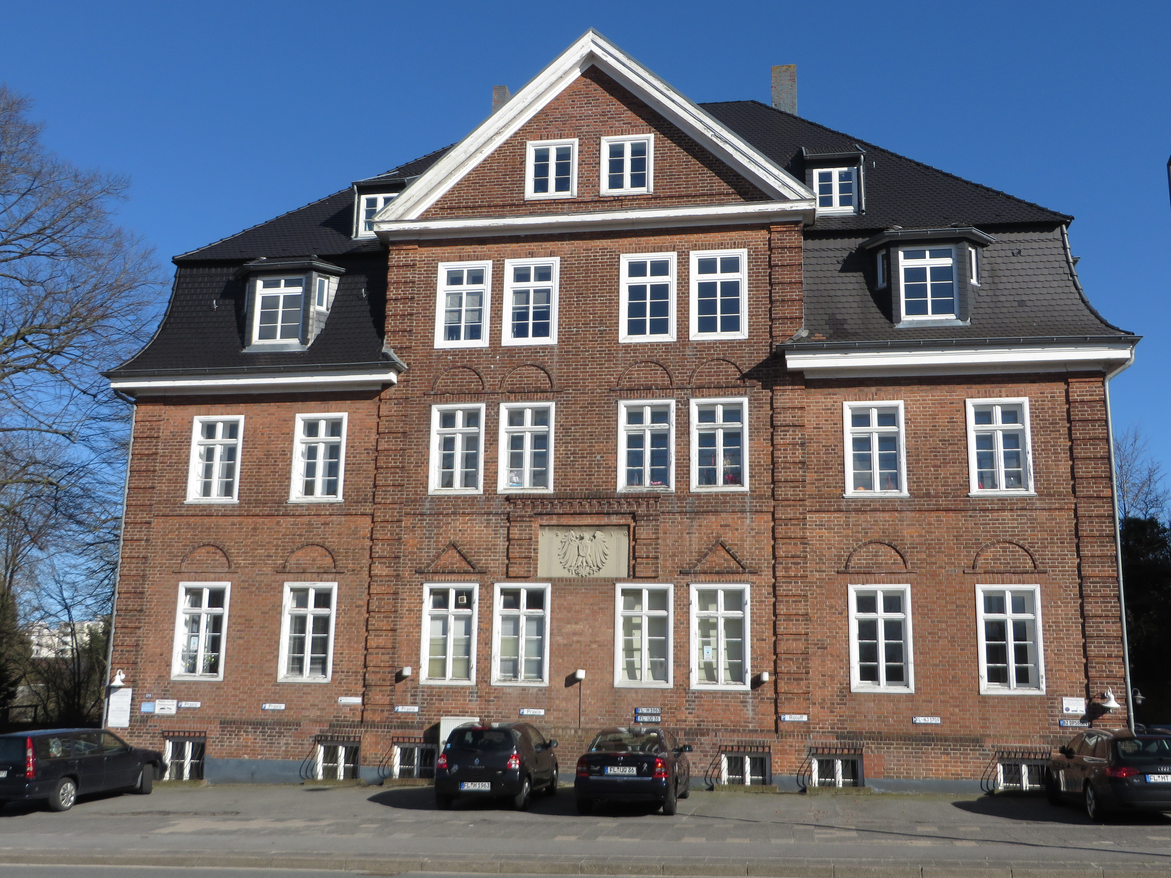 Kaiserliche Post Flensburg-Mürwik, von vorne (April 2015), Bild 04